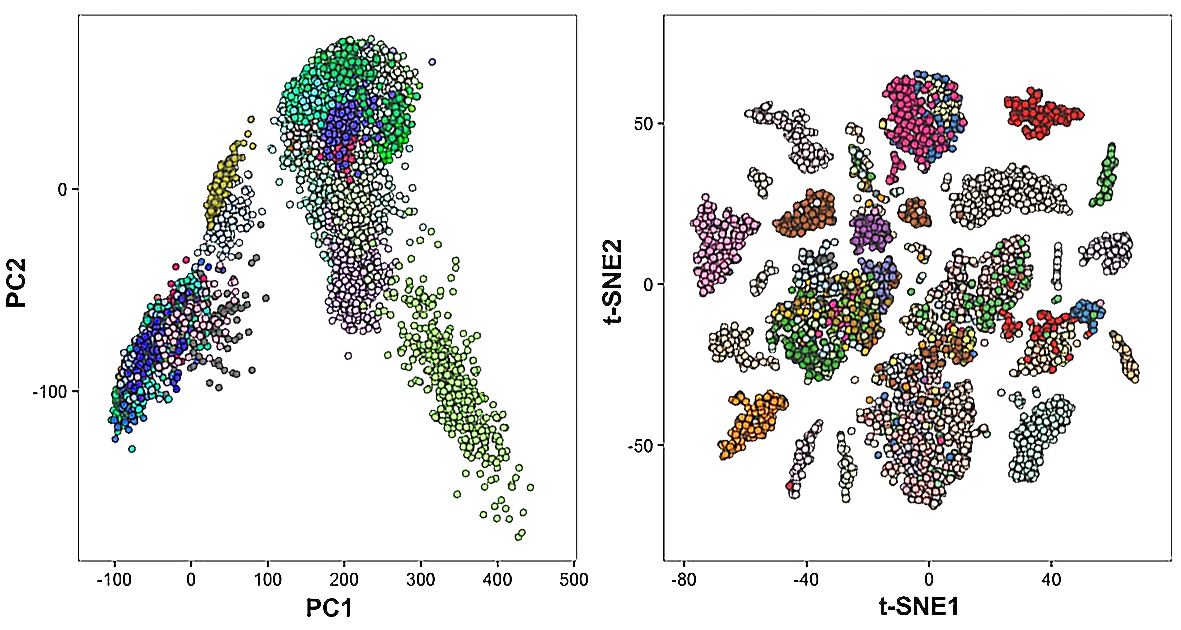 t-SNE and PCA plots with RNA-seq data